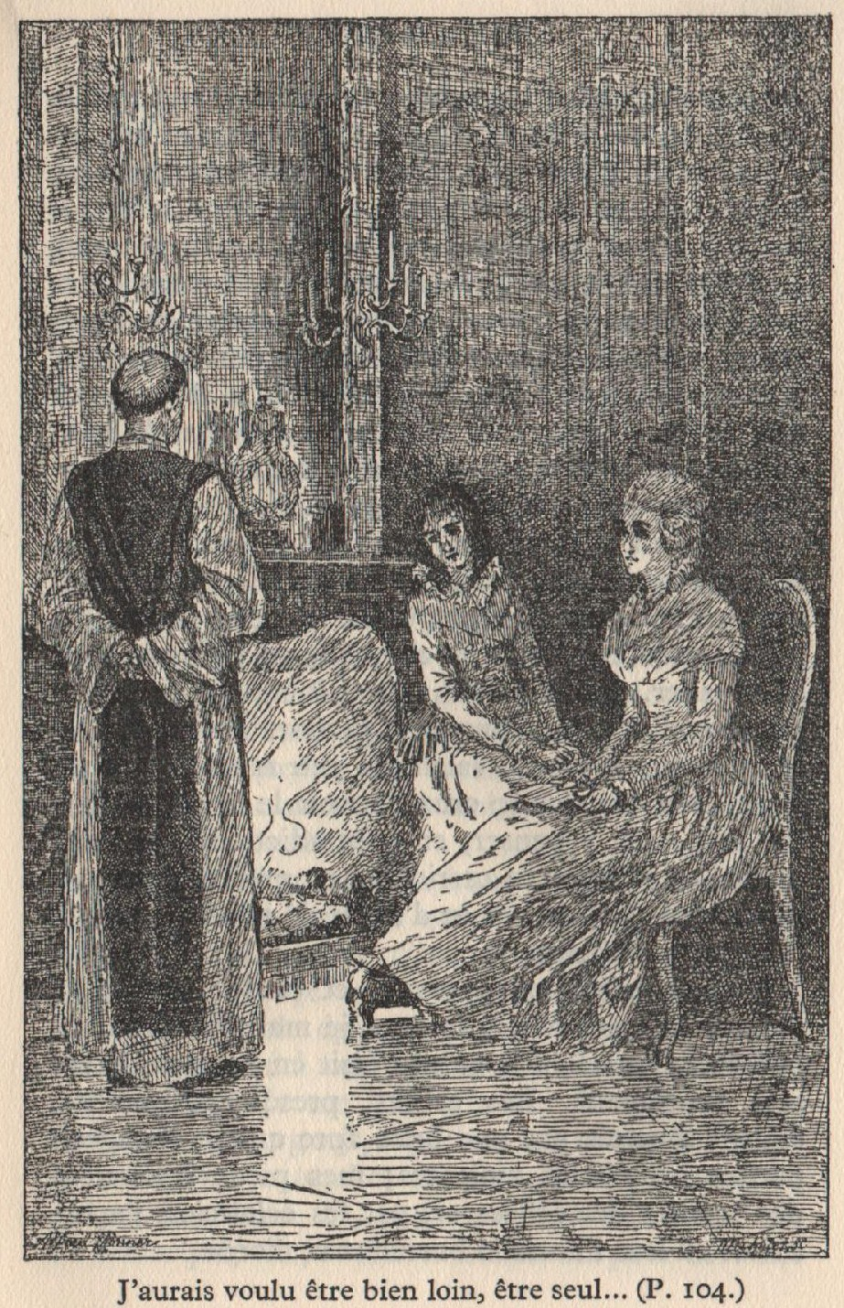 Illustration du live (1934) "Dom Placide, mémoires du dernier Moine de l'abbaye de Villers (-la Ville) " (Belgique) dessins de Alfred Ronner (1851-1901)